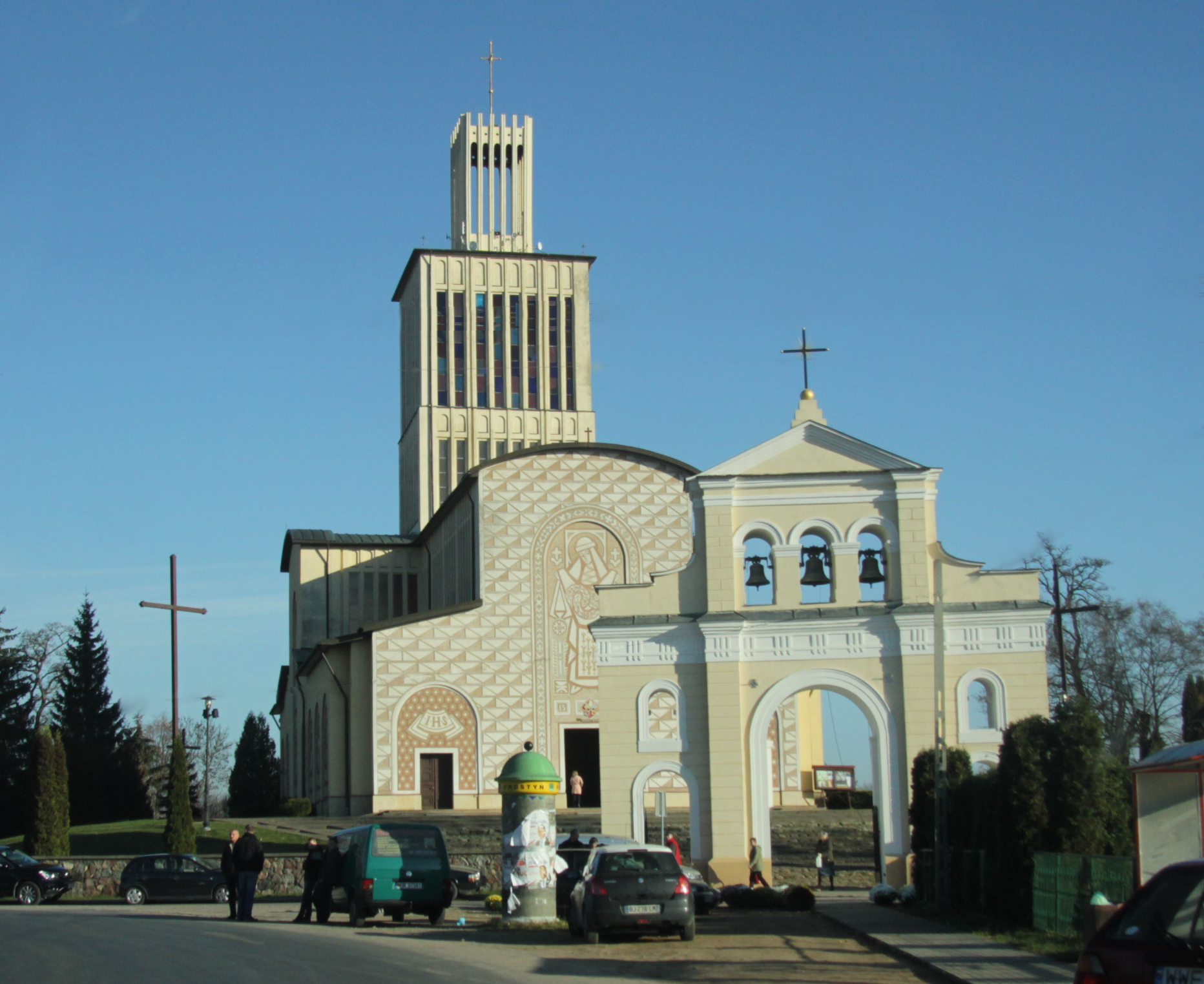 Prostyń - Bazylika Trójcy Przenajświętszej i św. Anny